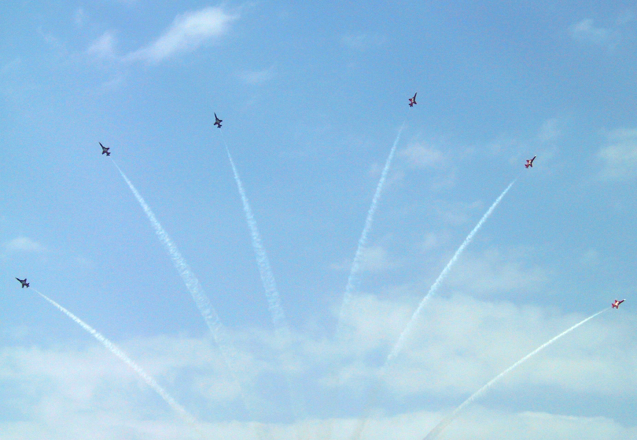 Flugschau der Patrouille Suisse auf der ILA 2002.